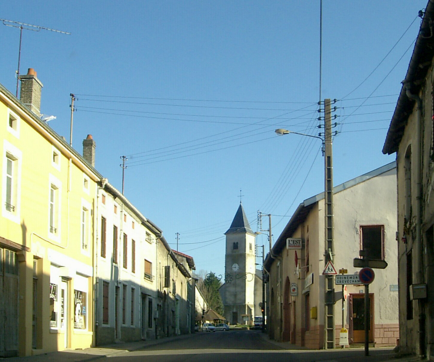 Ceintrey, rue de Nancy